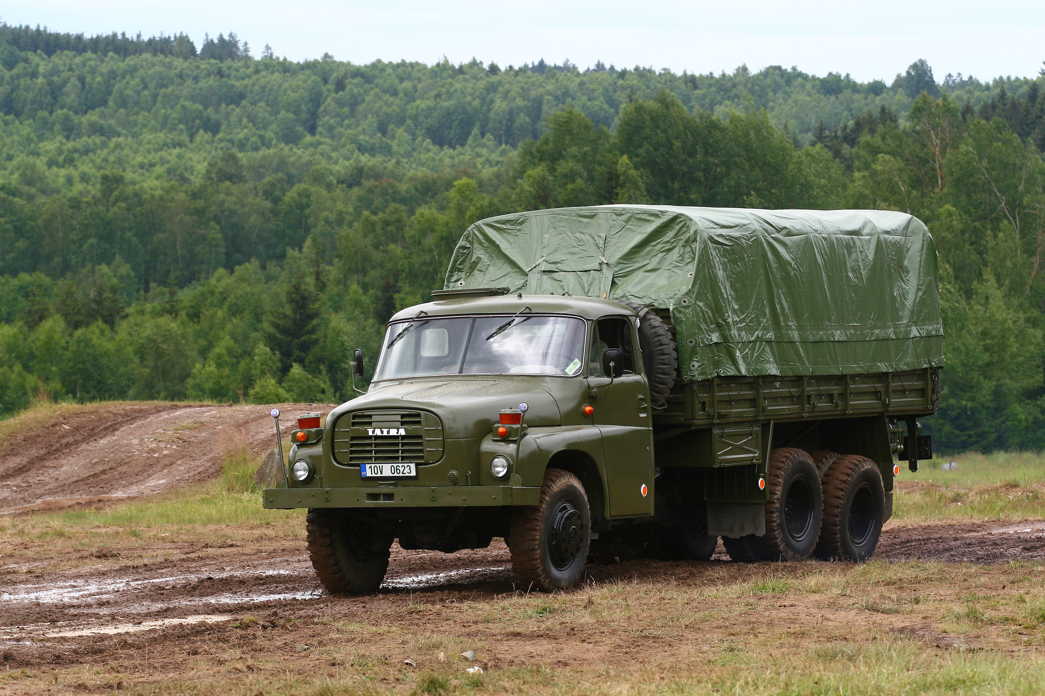 Vojenská technika zaznamenaná při dynamických ukázkách na Dni pozemního vojska BAHNA 2018, který pořádá Velitel společných sil a Nadace pozemního vojska AČR.